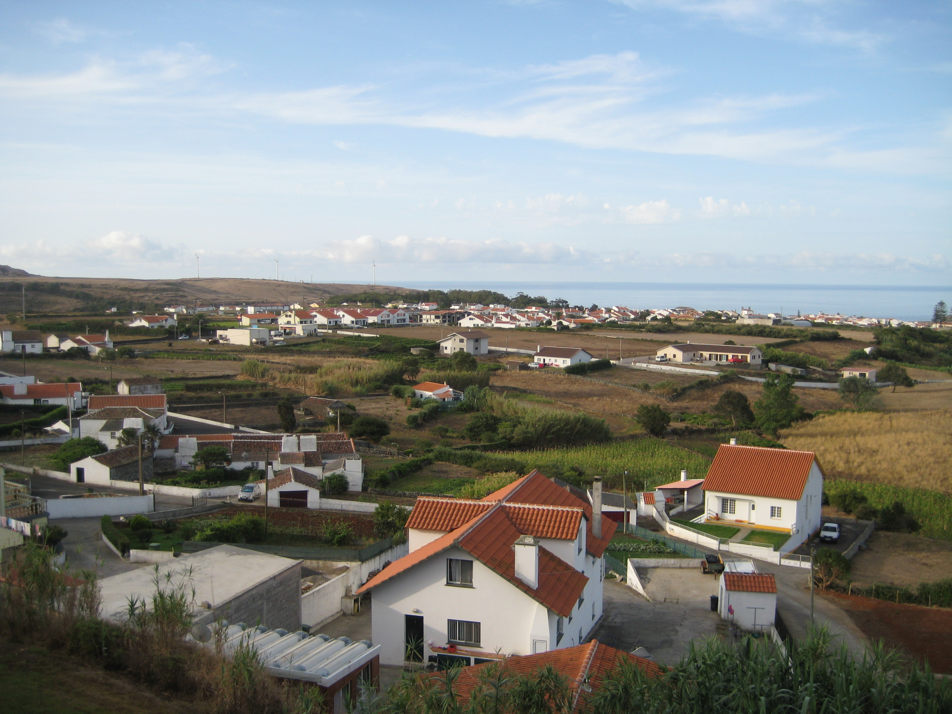 Vila do Porto desde el Hotel Columbus